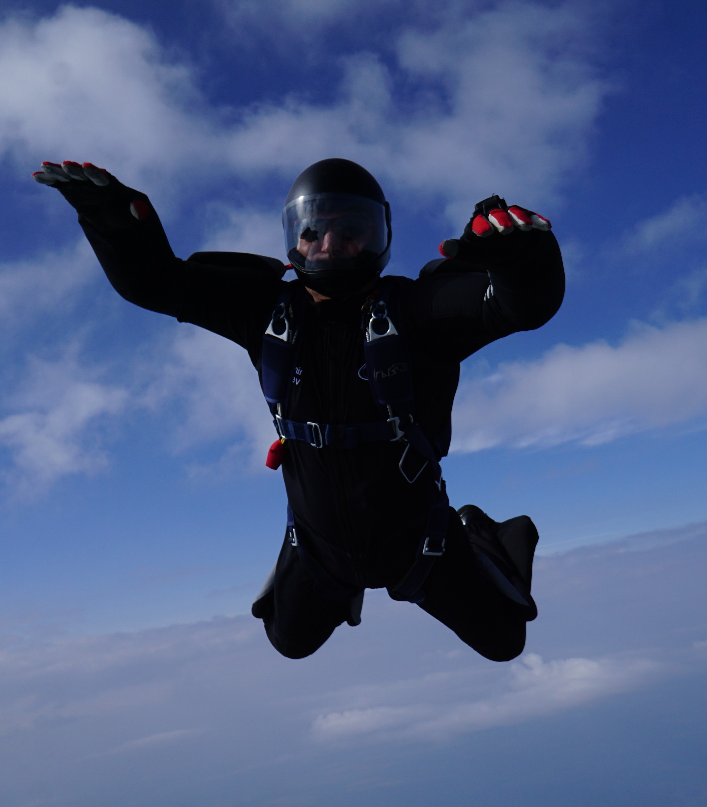 Dobromir Slavchev - skydiving, freefly